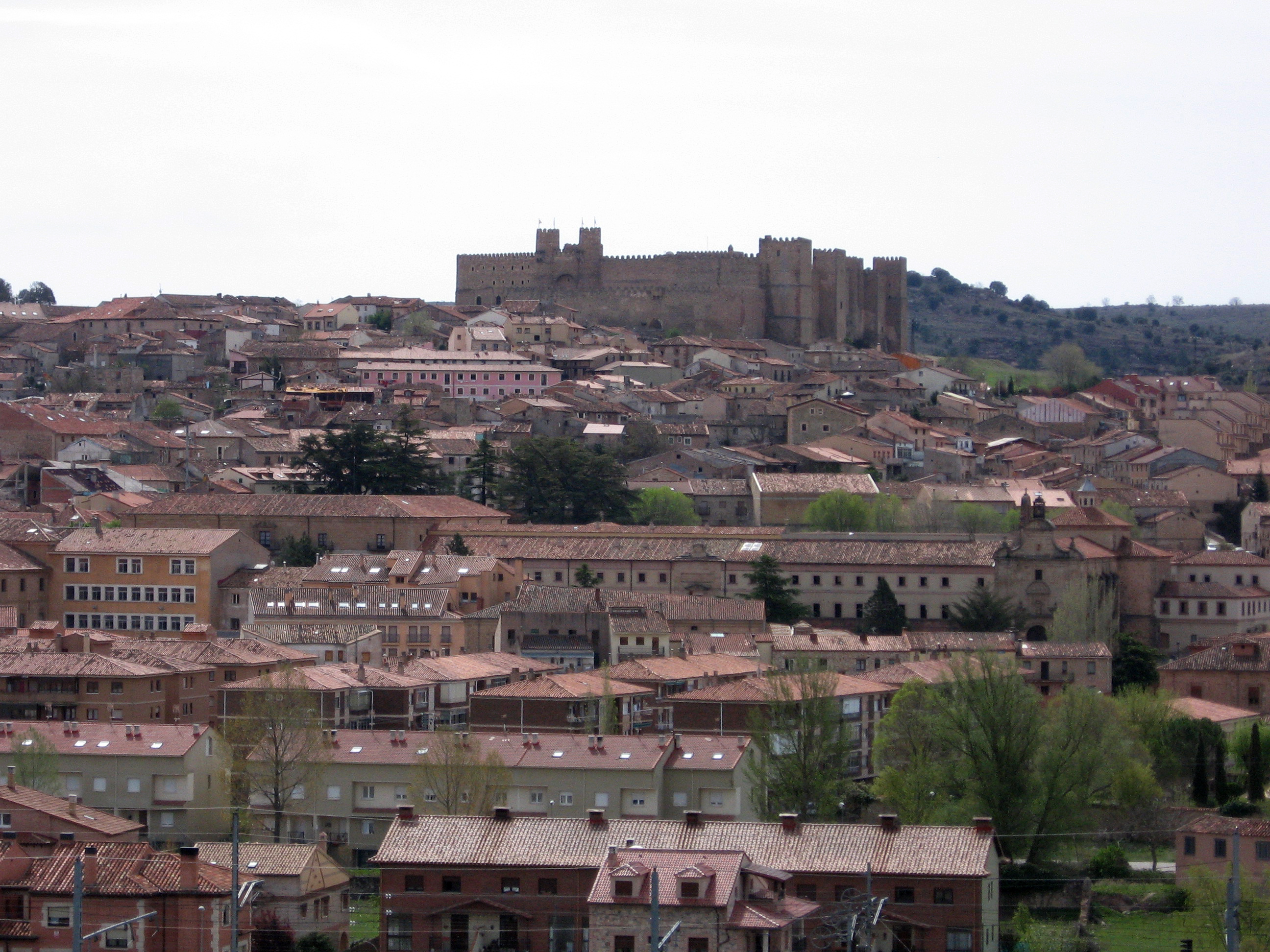 Sigüenza, Guadalajara, España.